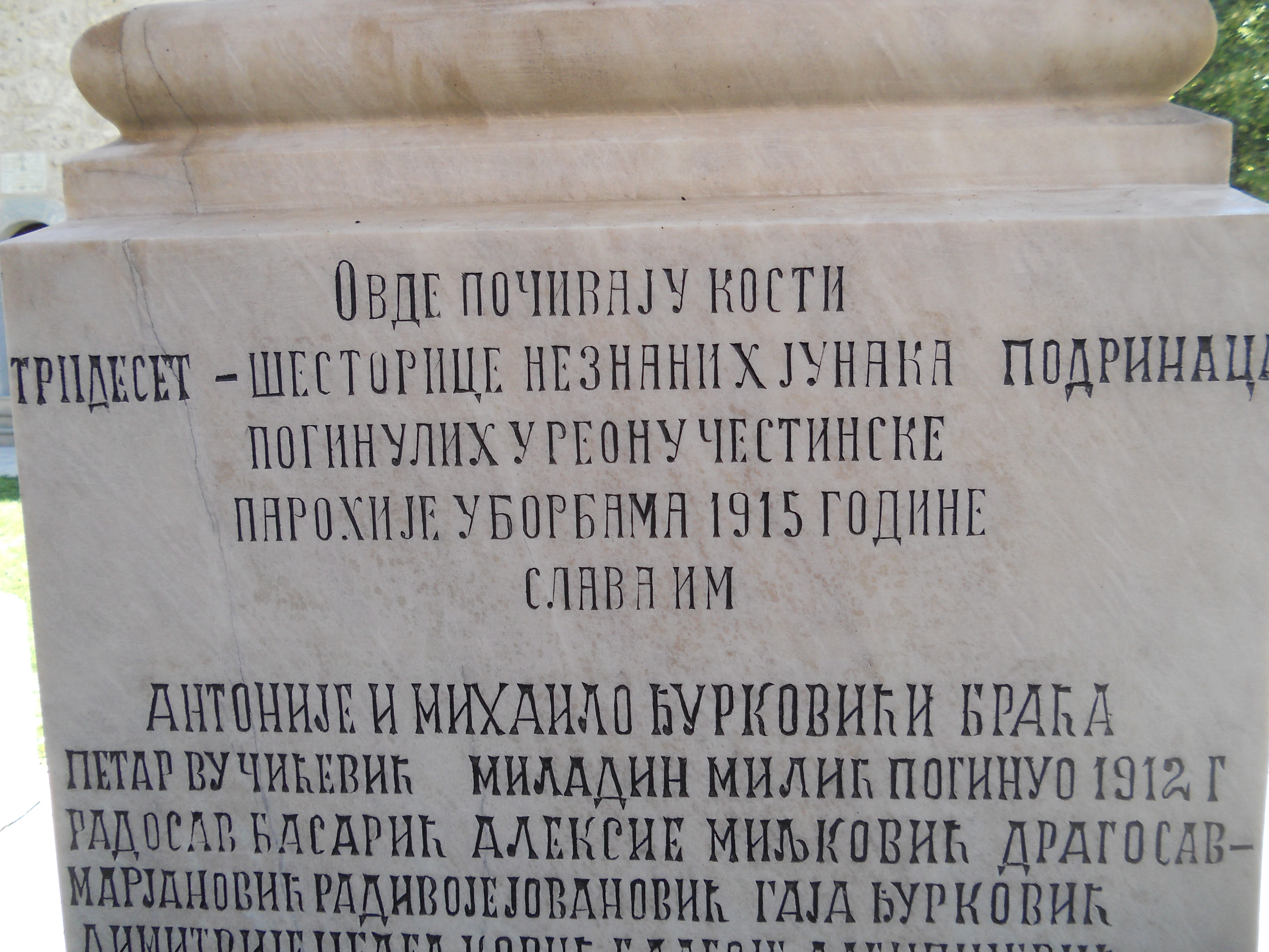 Manastir Kamenac